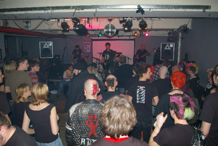 Paranoya Astakeller-Duisburg 20.01.07